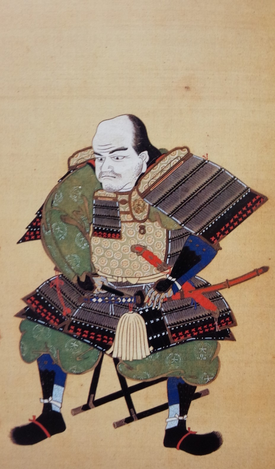 大久保忠世の肖像。